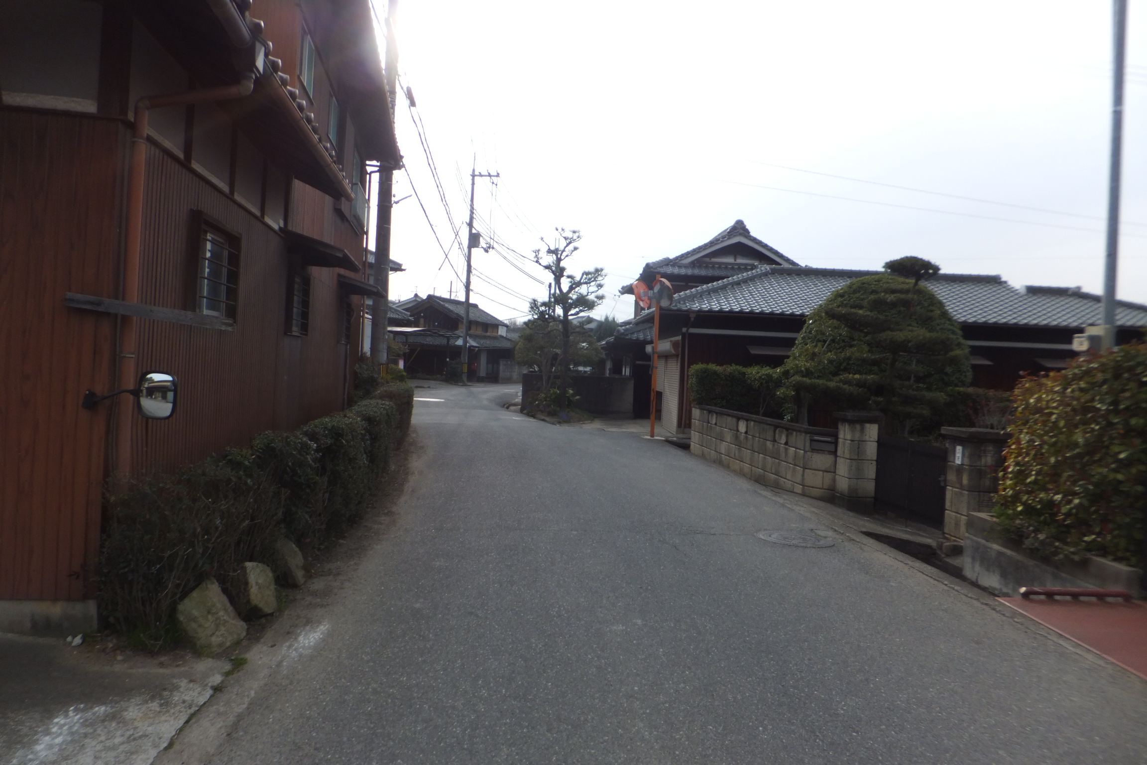 兵庫県三木市別所町石野